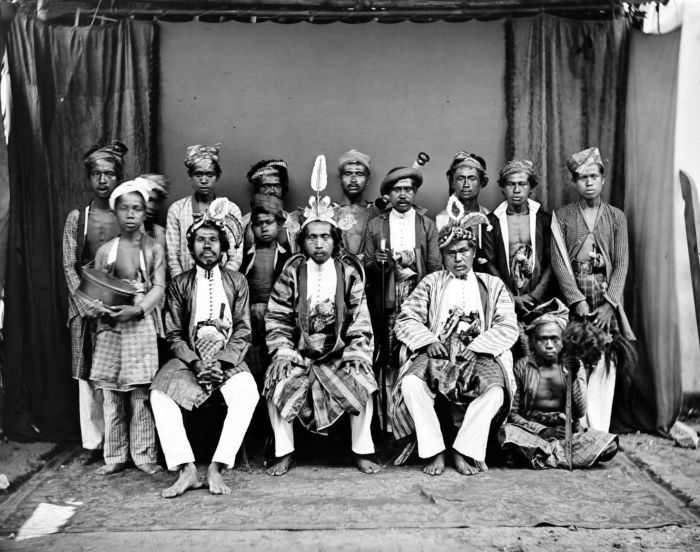 Negatief. Groepsportret met de gezant van Buton, Sulawesi